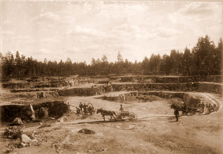 Единственная фотография того времени (конец 19 века). Автор фотографии неизвестен. Оригинал фото находится в Краеведческом музее города Асбест.